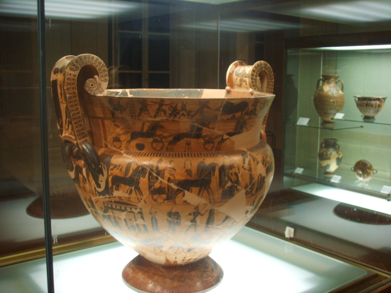 Athenian volute-krater.